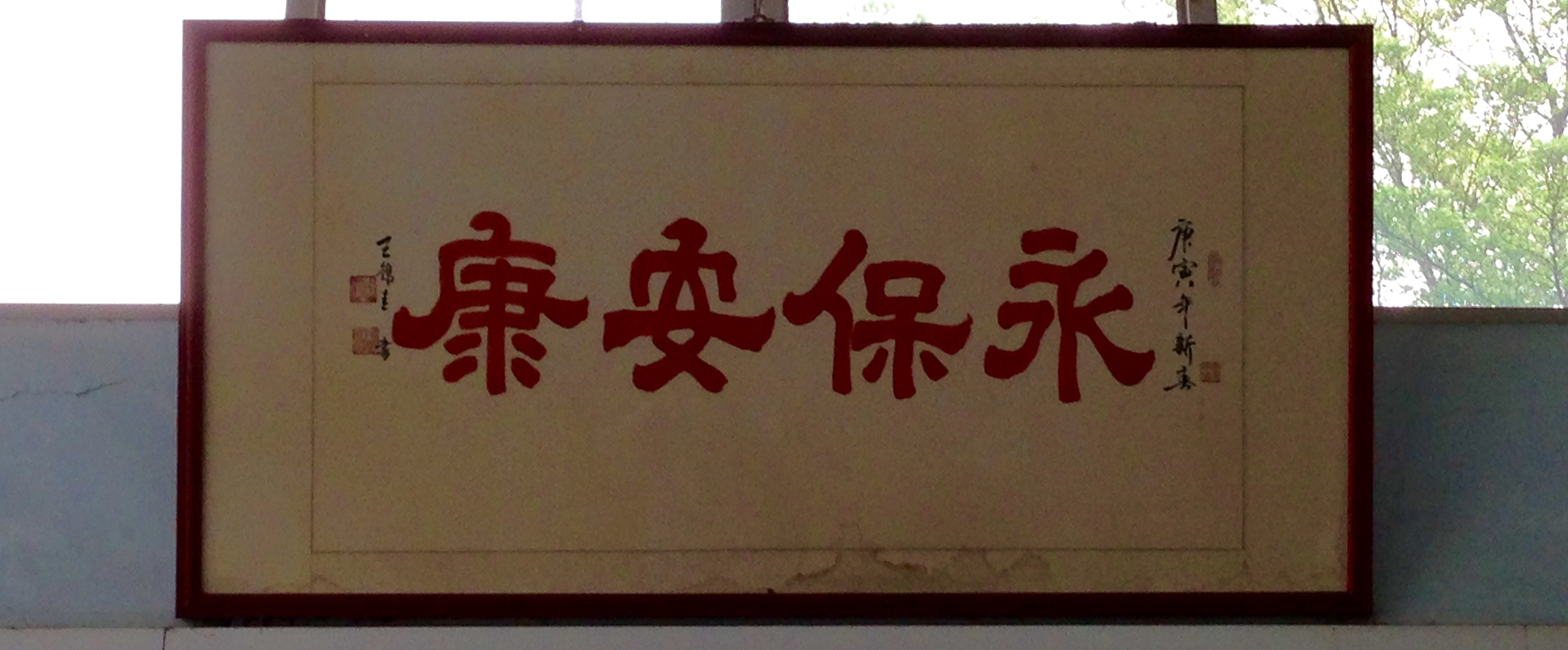 中文（台灣）: 永康車站的永保安康牌匾